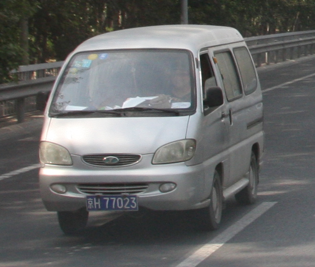 FAW Jilin Jiebao CA6360